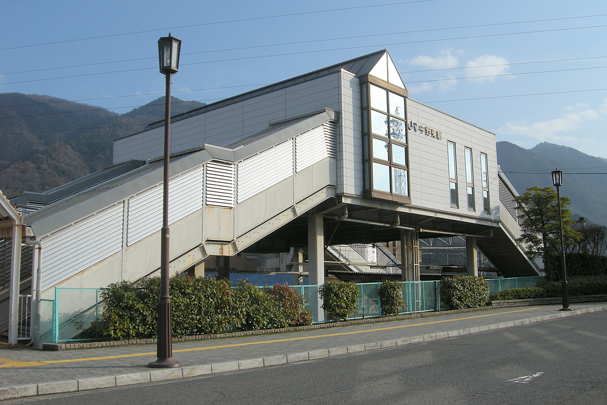 中野東駅 Nakanohigashi station